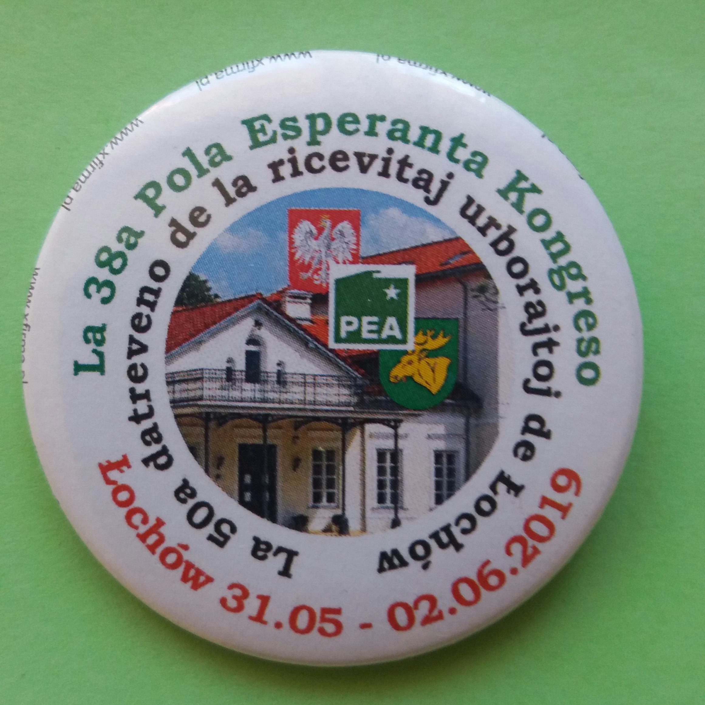 Kongresa insigno 38-aPEK